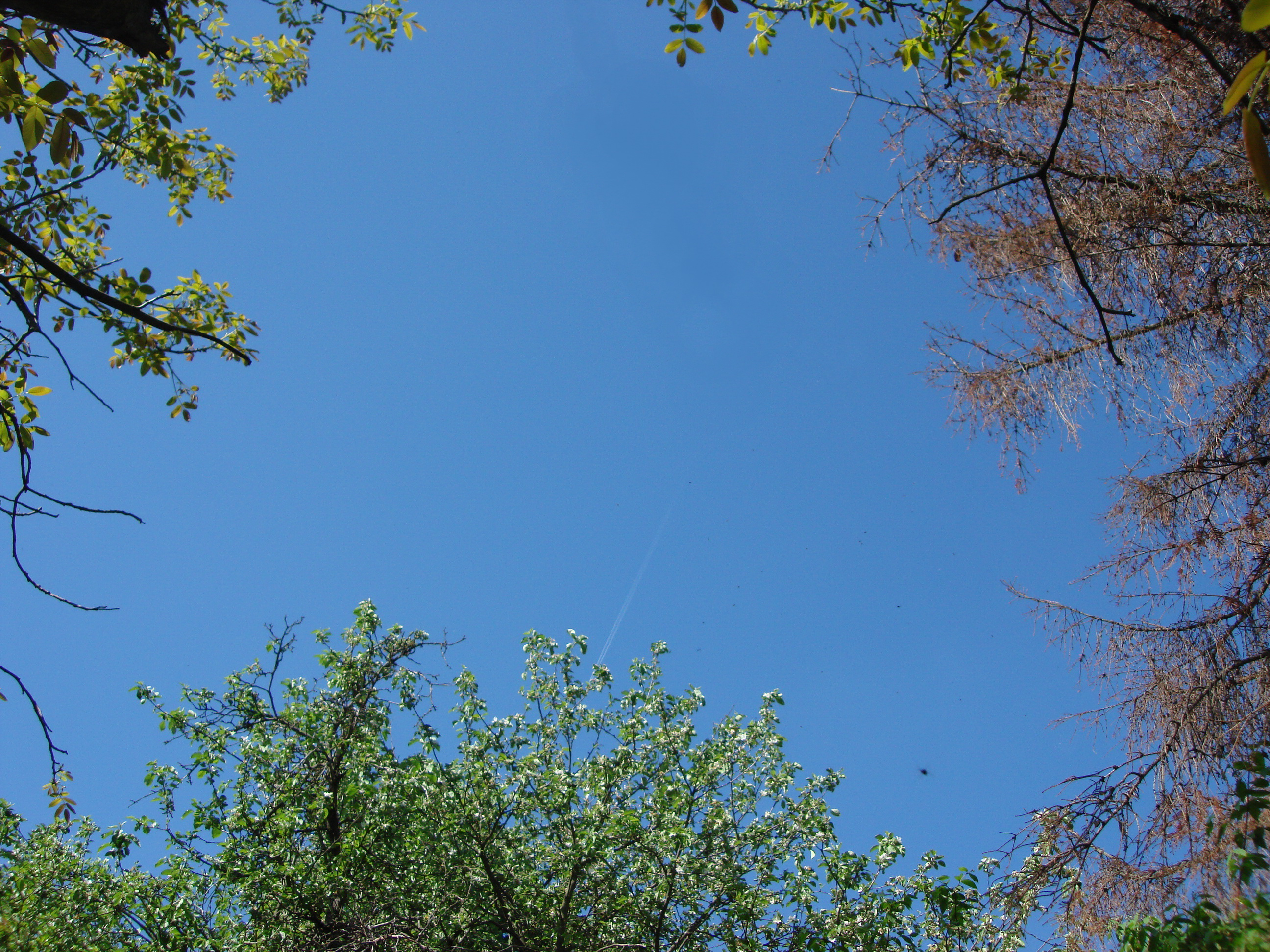 Сине_небо_с._Сингаї_Коростенського_району